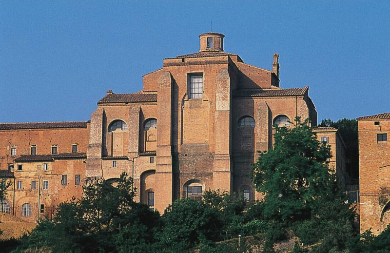 Vue de l'église Sant'Agostino de Sienne (Italie)